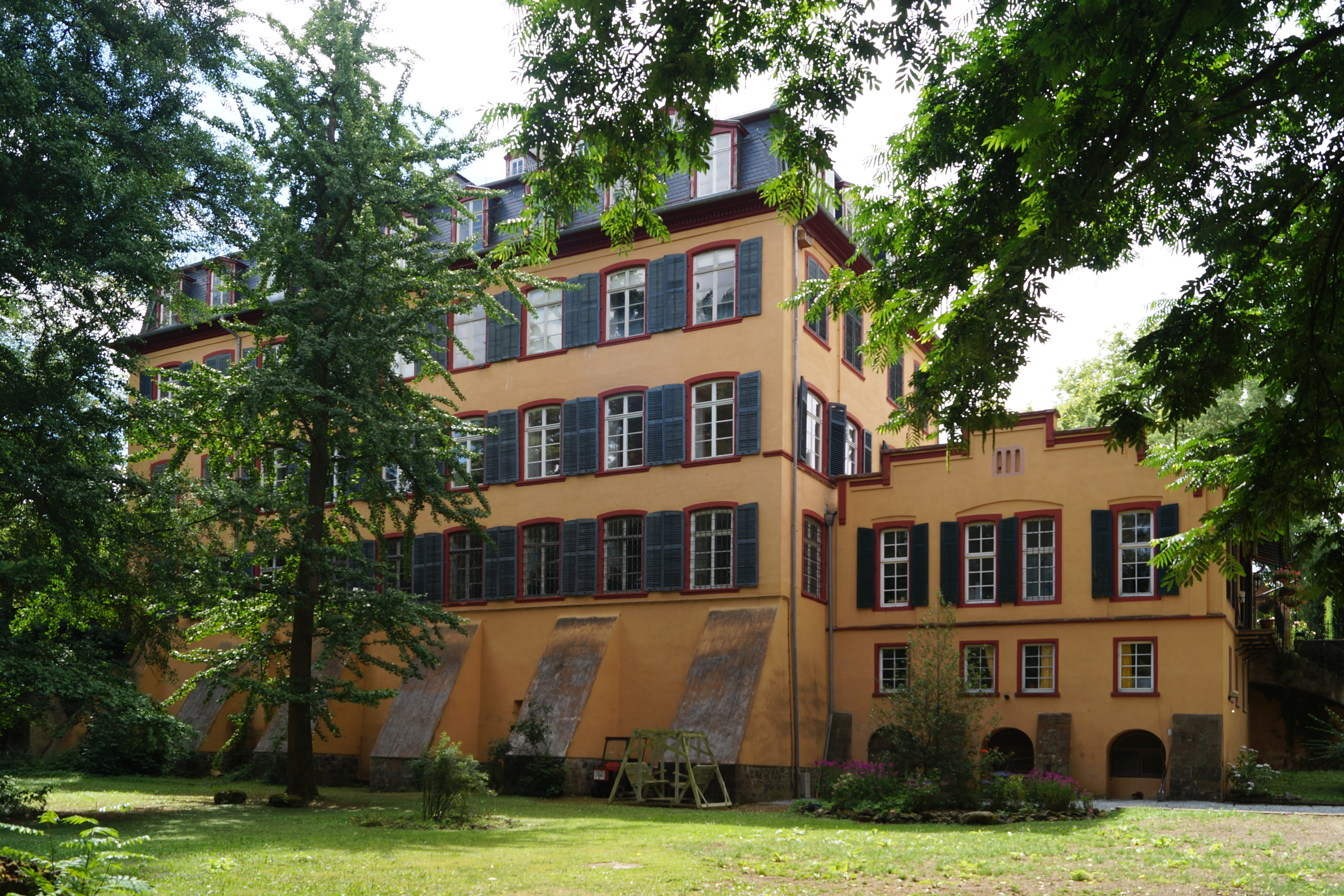 Schloss Assenheim in Niddatal-Assenheim, Wetteraukreis, Hessen. Ansicht von der Niddaseite (NO) 2015.